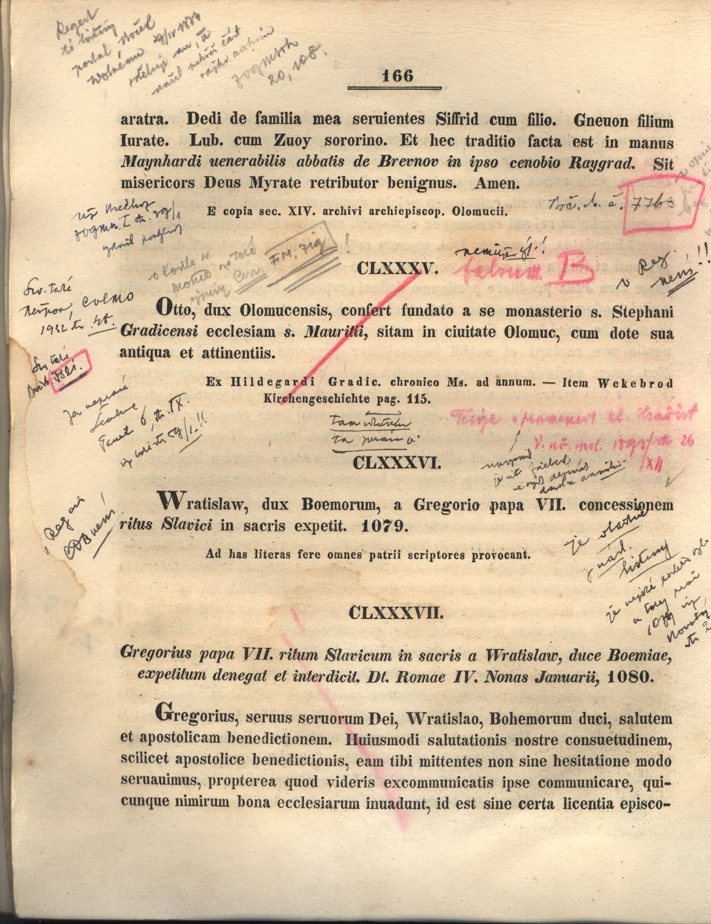 Jedna ze stran prvního dílu ediční řady Codex diplomaticus et epistolaris Moraviae s vyznačeným falsem prof. Jindřichem Šebánkem